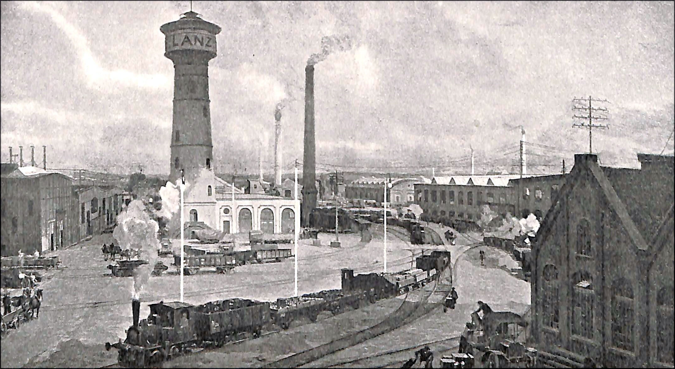 Mannheim - (fiktive) Ansicht der Heinrich Lanz Werke, im Bild ist ein Gleisanschluss der Industriebahn zu sehen.